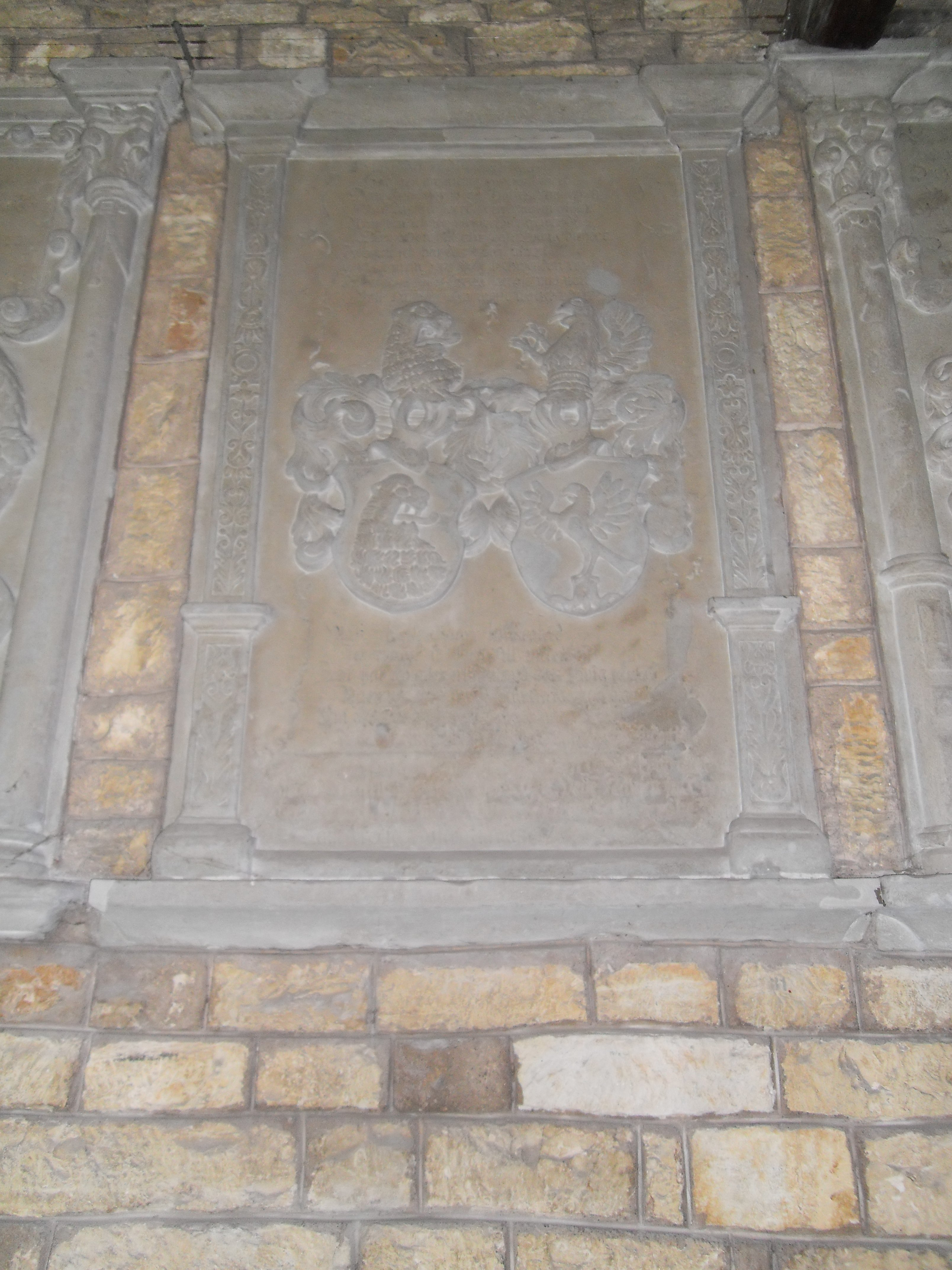 Epitaph Hans Im Thurn und Margarethe Im Thurn - Stockerin